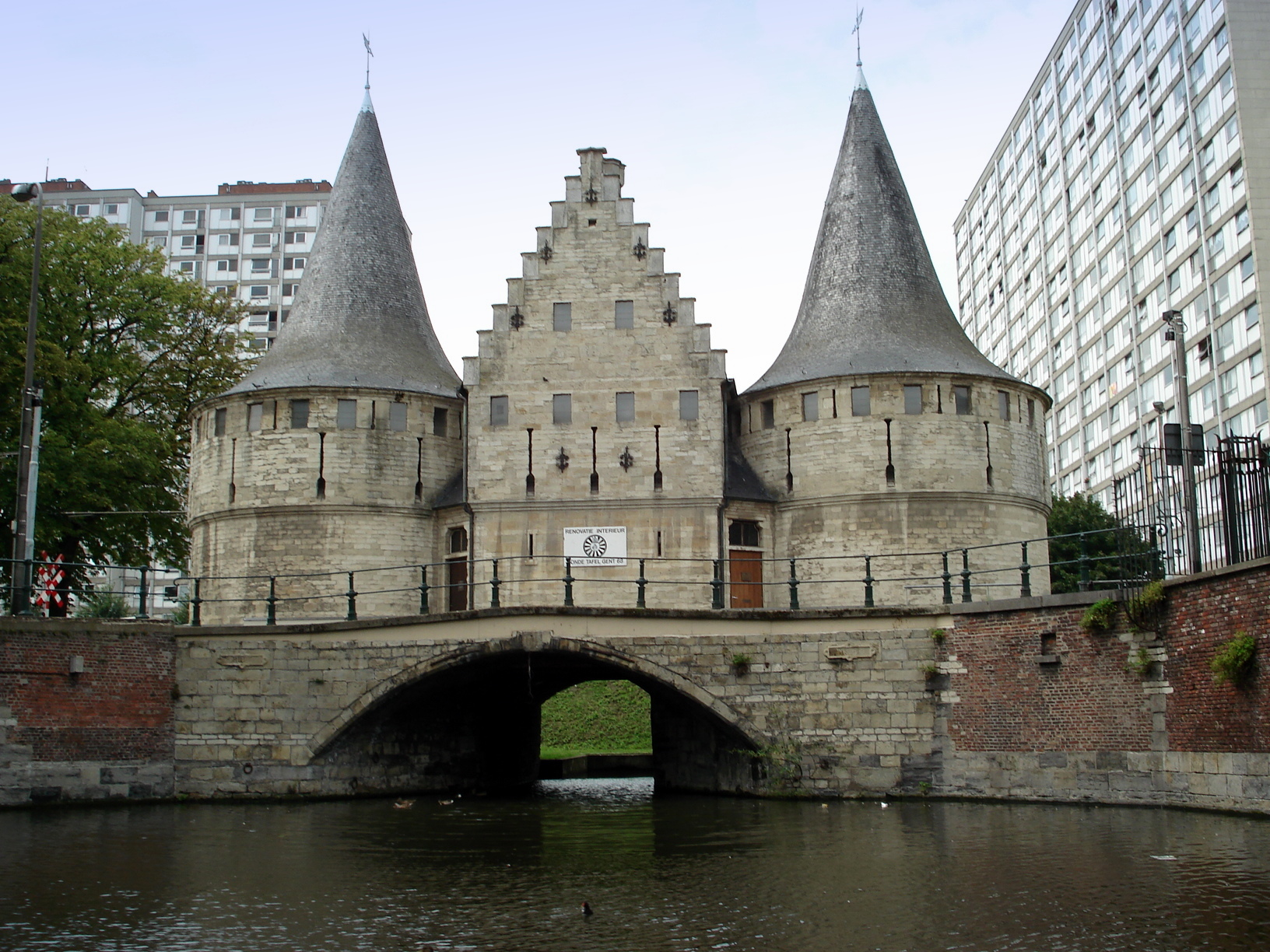 Het Rabot te Gent. Versterkte sluis uit de 15e eeuw. Le Rabot (écluse de garde fortifiée, 15e siècle), à Gand.